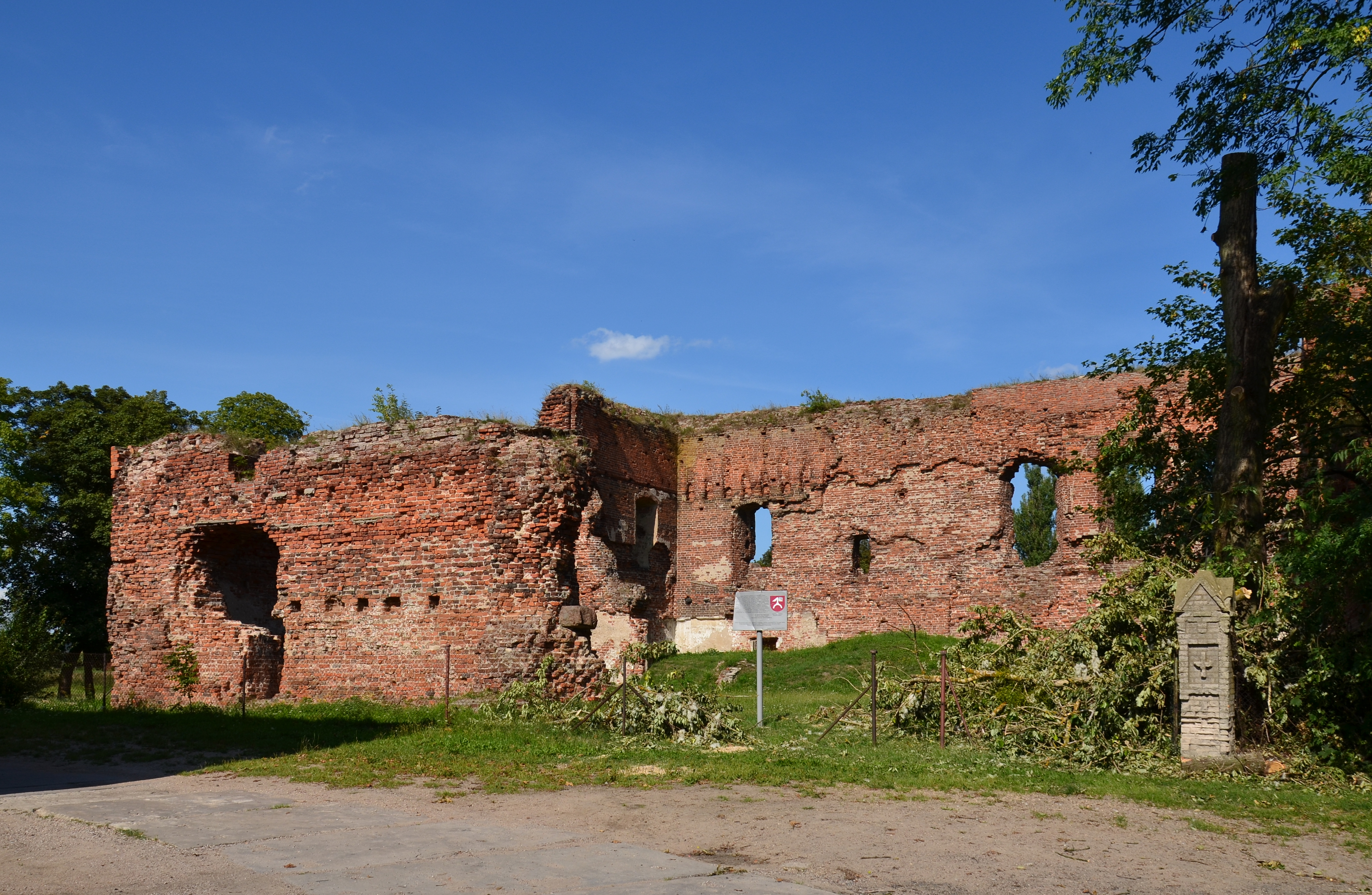 Radziki Duże, ruiny zamku, 1405-1466, 1510